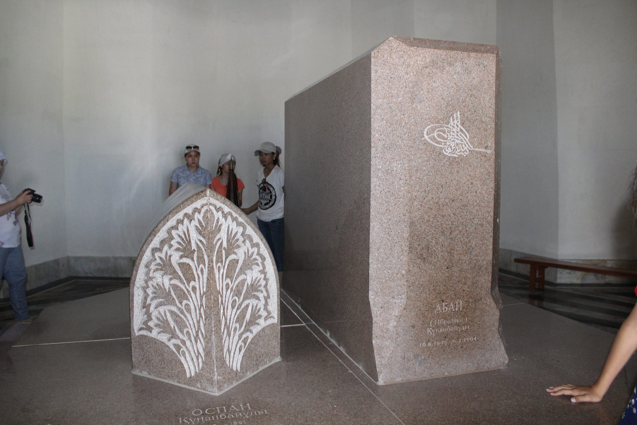 Қазақша (кирил): Абай мен оның інісі Оспанның зираттары